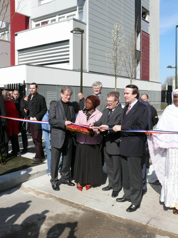 Villetaneuse : Inauguration de la restructuration de la Cité Allende et de la réalisation de la première tranche des espaces publics du Projet Universitaire et urbain (PUU). De gauche à droite : Patrick Braouezec, Député, Président de Plaine Commune ; Rose Djob, présidente de l'association de quartier ; Jacques Poulet, Maire de Villetaneuse ; Jean François Cordet, Préfet de Seine-Saint-Denis